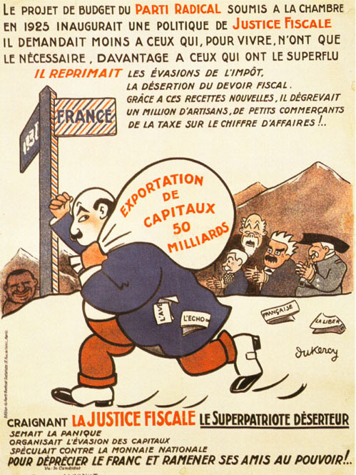 Le superpatriote déserteur, affiche polychrome « Campagne électorale du Parti Radical Socialiste », par Pierre Dukercy (alias Pierre Mejecaze), avril 1929 (Bibliothèque Nationale, Dukercy AA aff. Toile Dn°4).